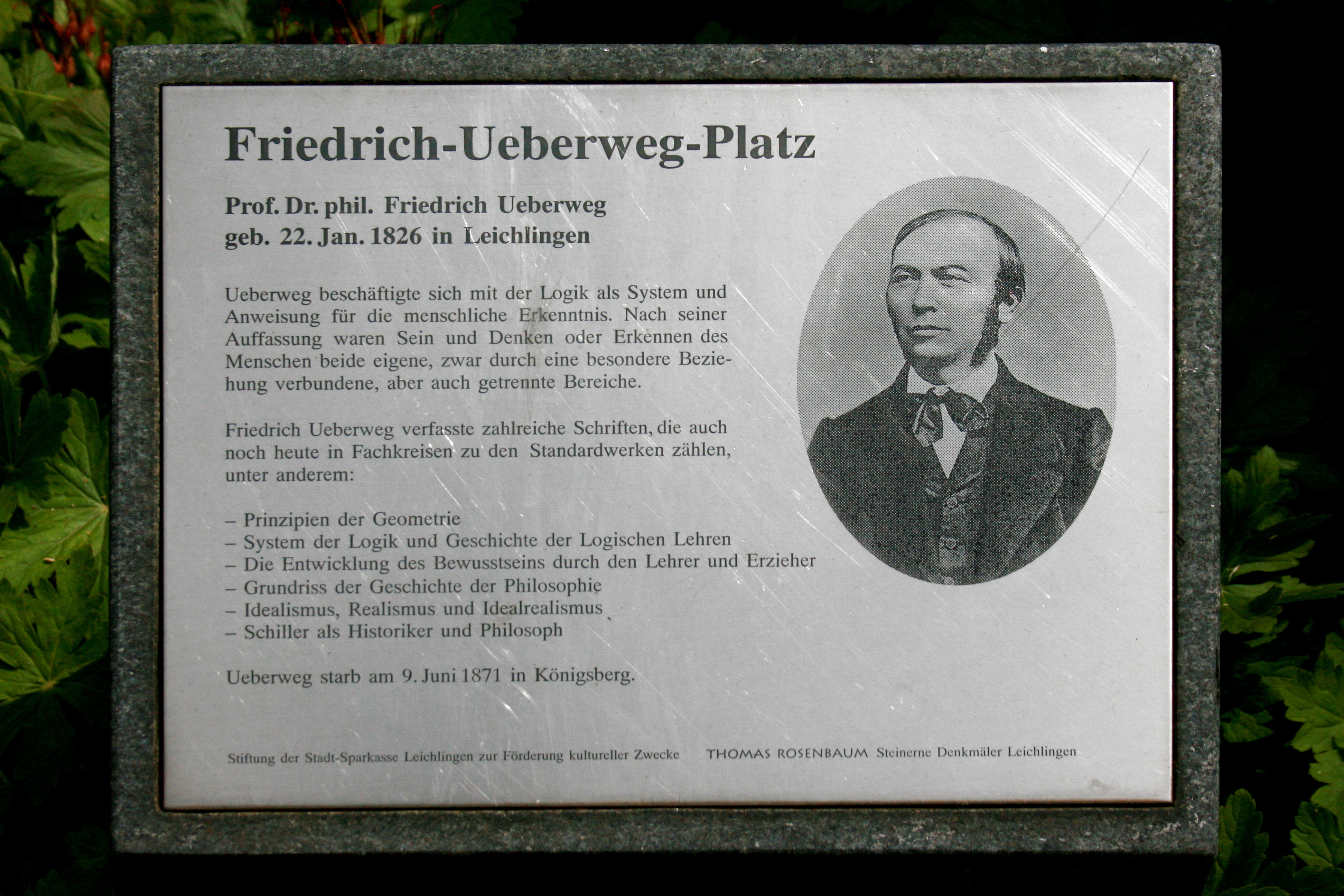 Friedrich-Ueberweg-Platz, Ecke Marktstraße / Mittelstraße in Leichlingen